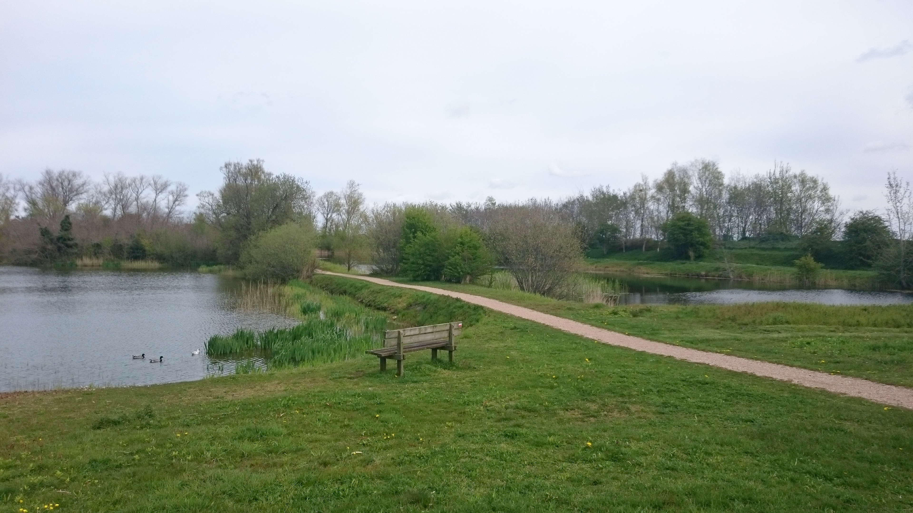 Les étangs Markey à Adinkerke.